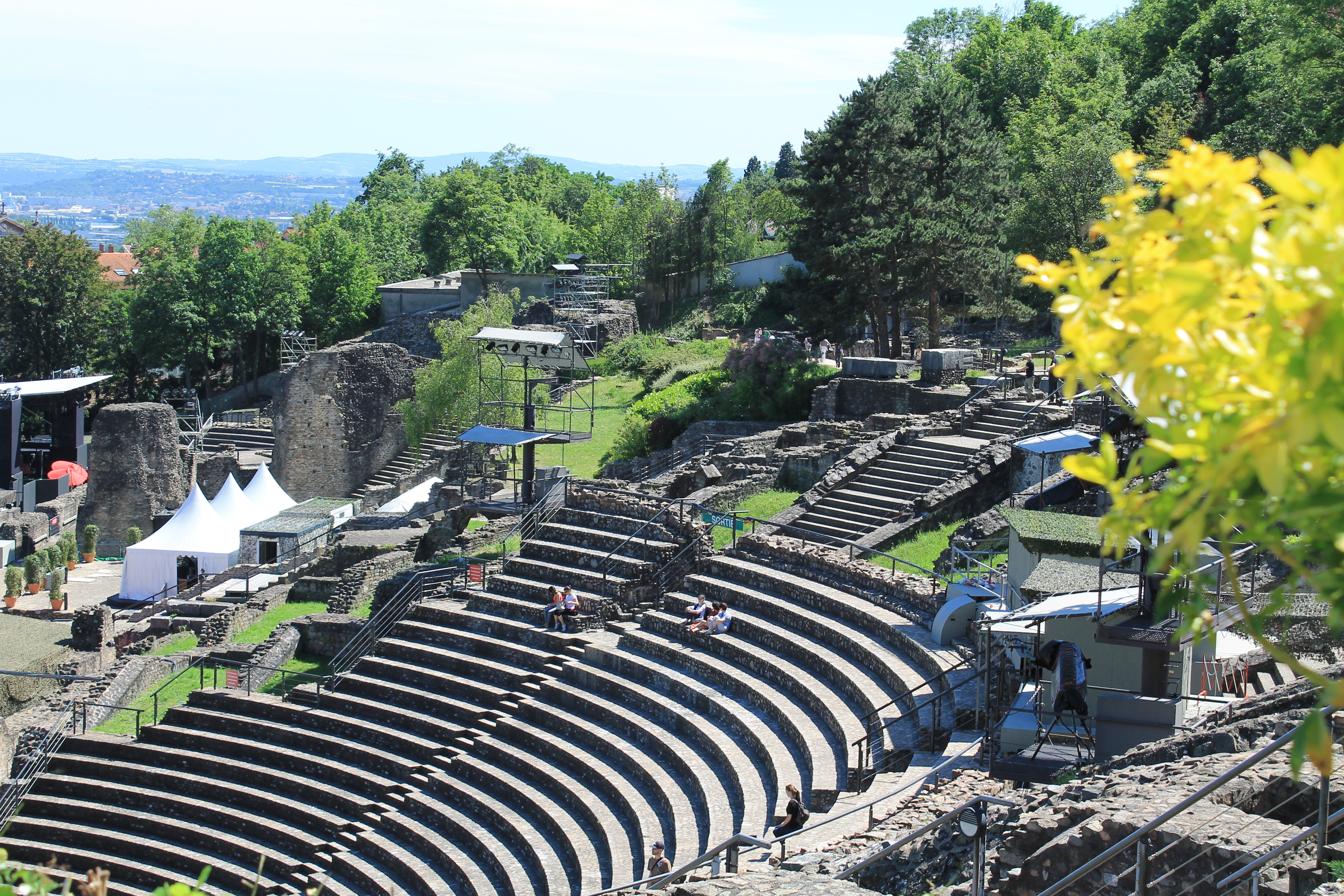 Lyon